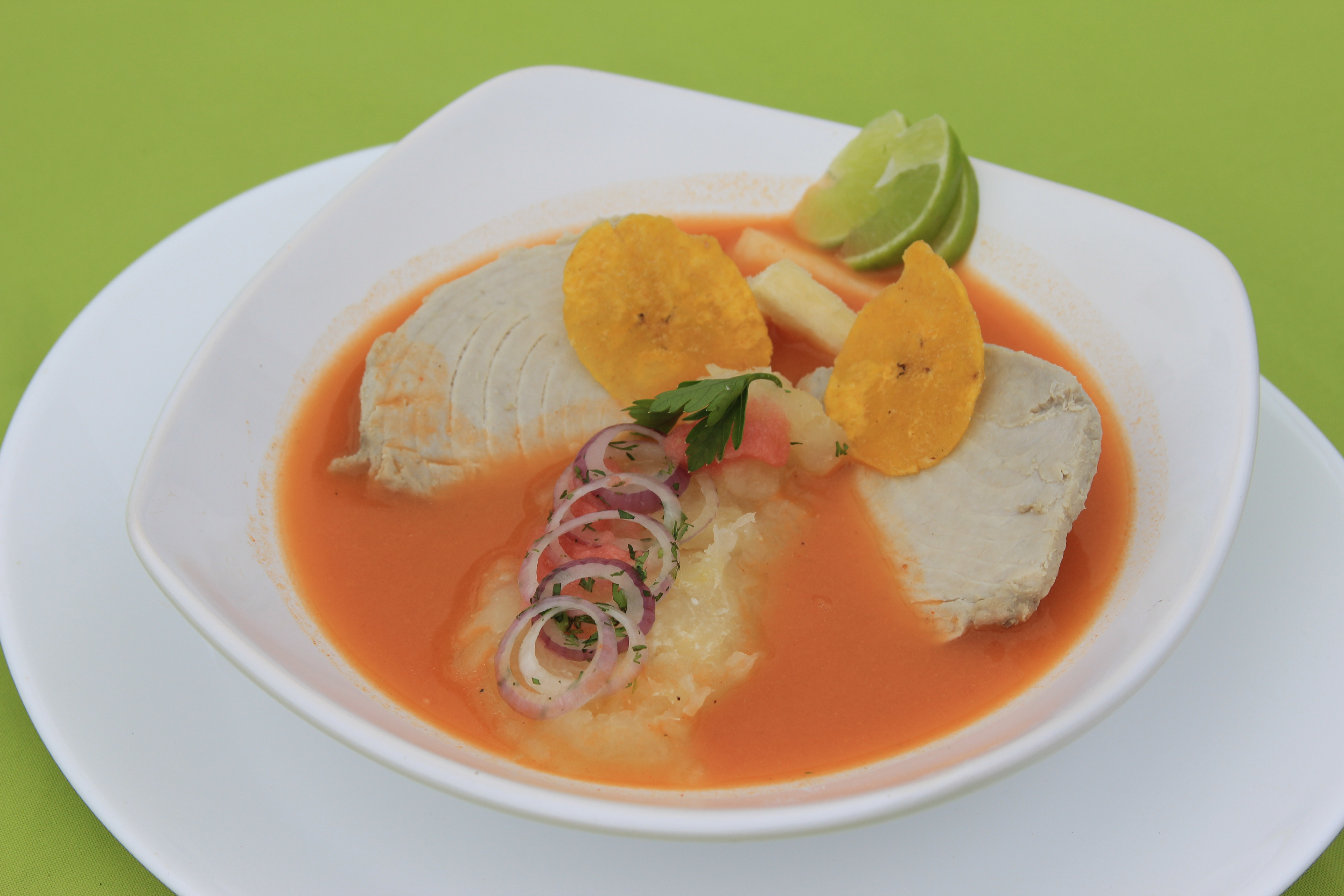 Semifinal Encebollado - Guayas y Santa Elena 2015